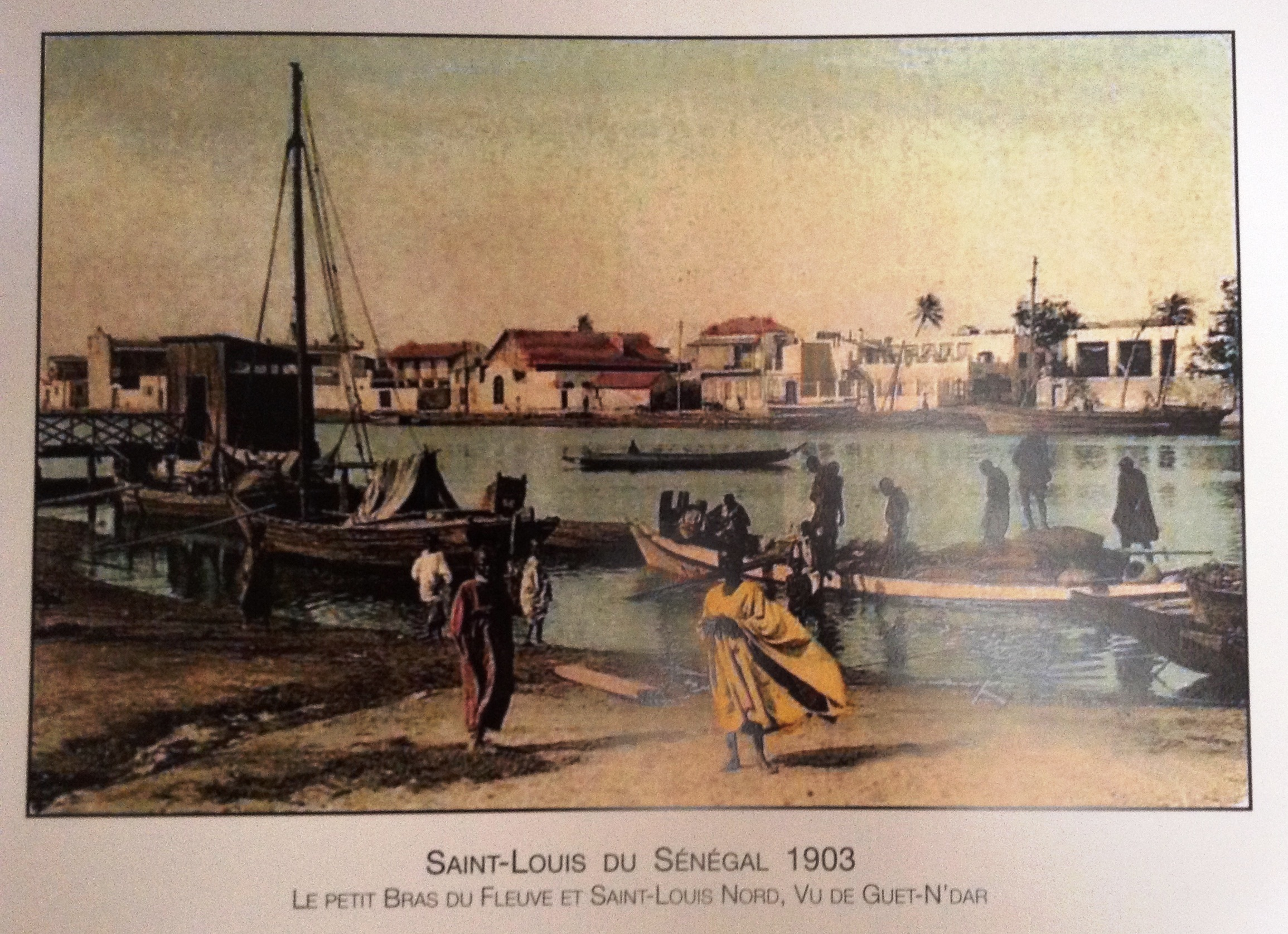 Le petit bras du fleuve et Saint-Louis Nord (en 1903)